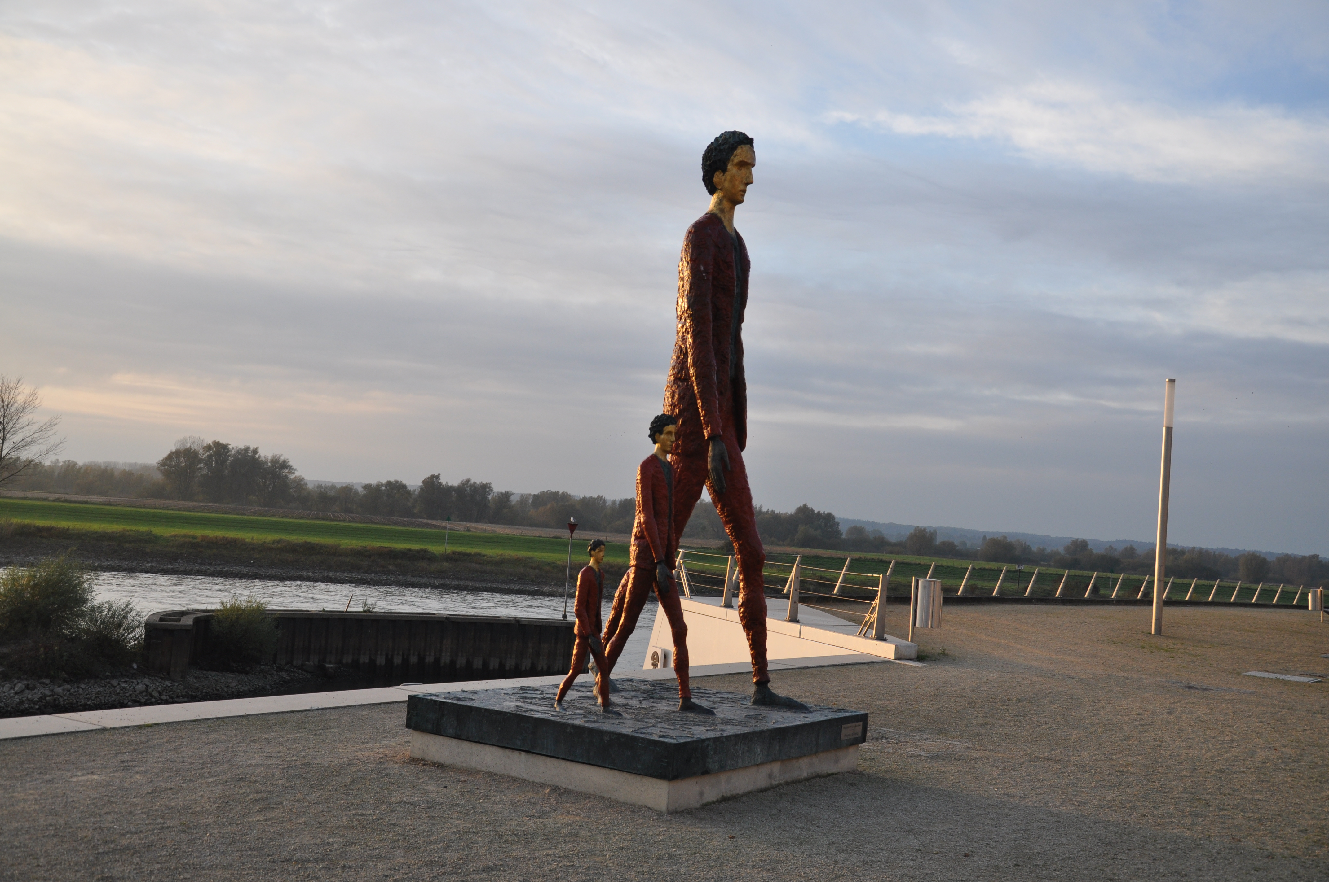 Beeld van wandelaars te Doesburg